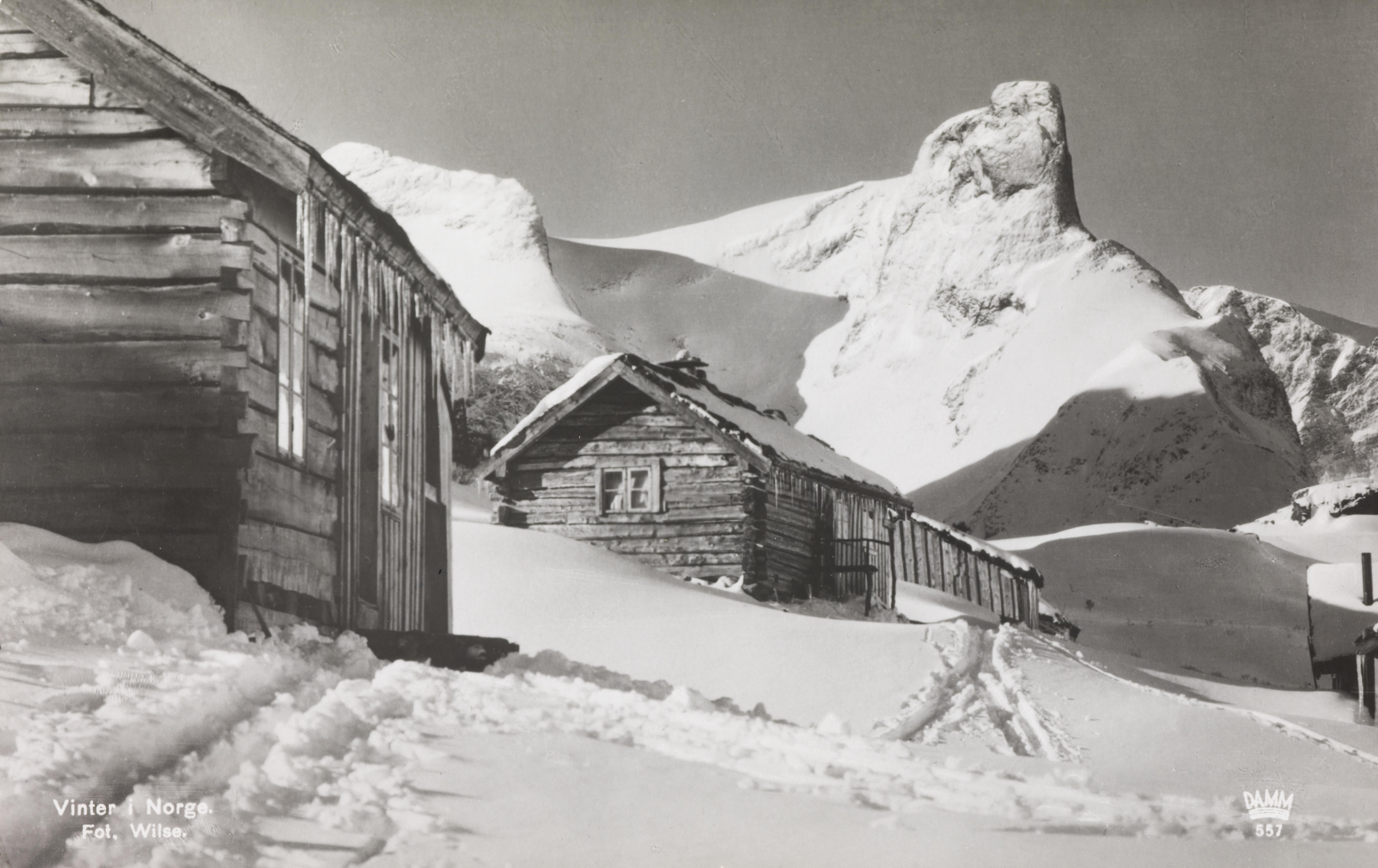 Bildet er hentet fra Nasjonalbibliotekets bildesamling Romsdalshorn, Rauma, Møre og Romsdal